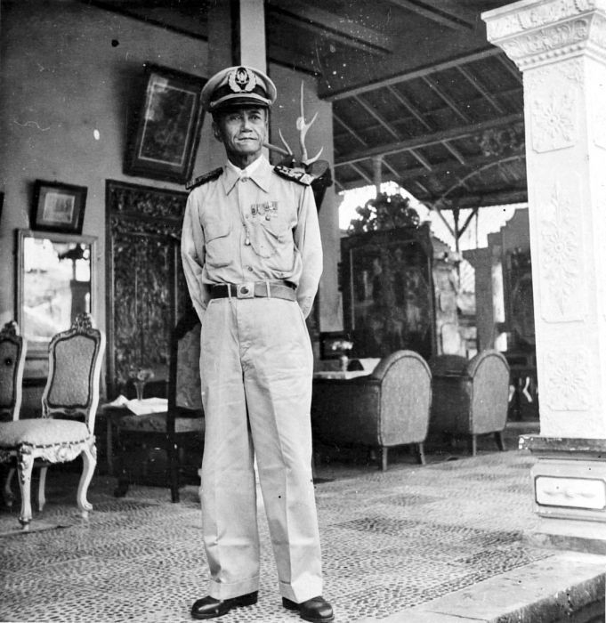 Repronegatief. Het witte stoeltje behoort tot het meubilair dat Koningin Wilhelmina aan de vorst van Karangasem heeft geschonken. Het staat anno 2009 nog steeds in het gebouw dat op de achtergrond te zien is; Maskerdam, een verwijzing naar Amsterdam.. Portret van de Radja van Karangasem in uniform voor het gebouw Maskerdam